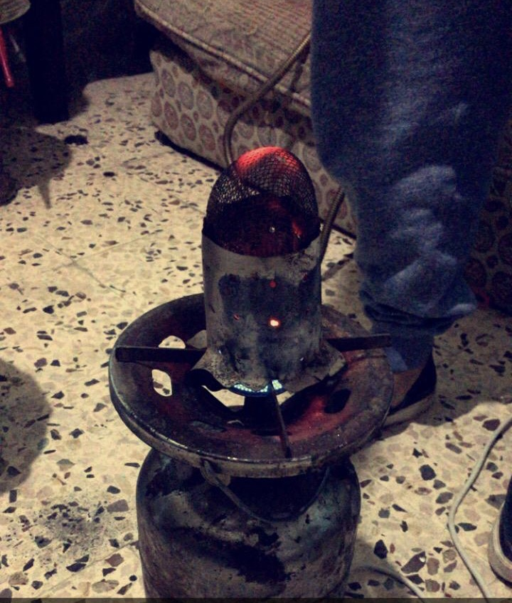 صوبة احمد